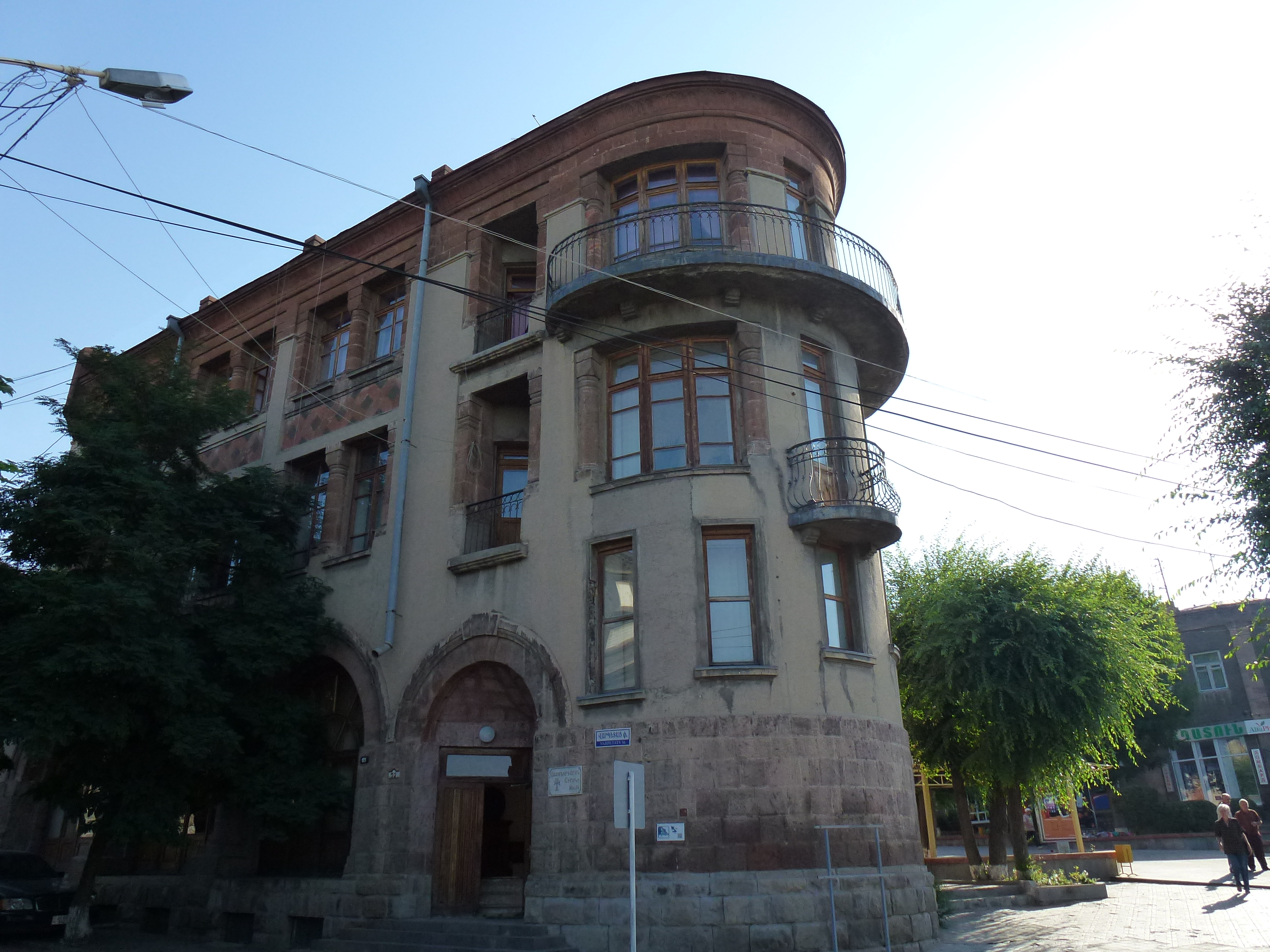 Գյումրիի Նավատիպ շենքը 1/4